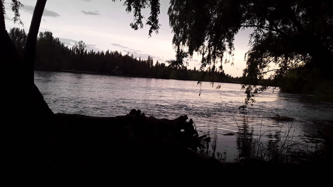 Imagen del rio Limay en la provincia Neuquen